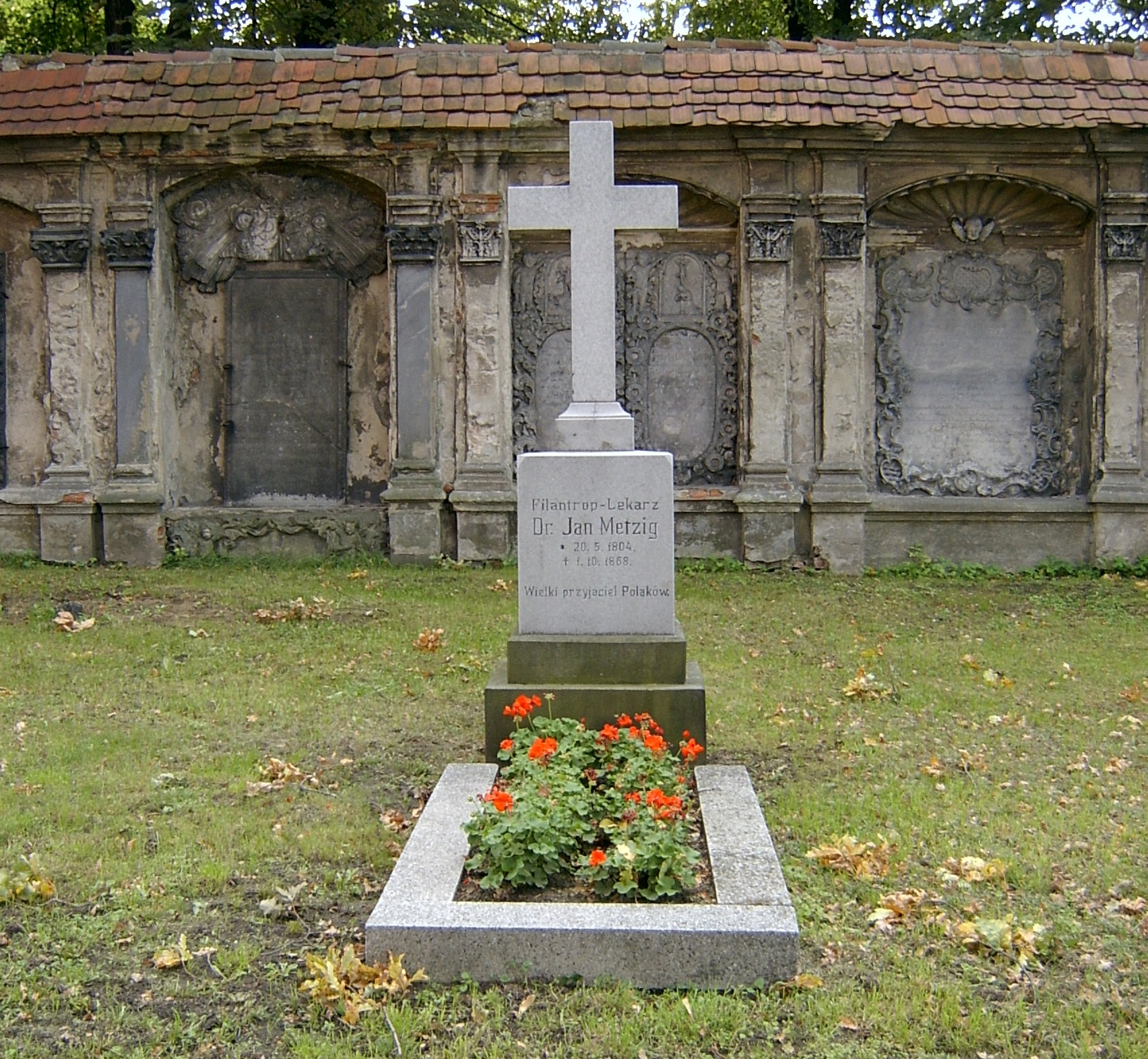 Kościół Św. Krzyża w Lesznie Grave of Dr. Johann Metzig (1804-1858) (polish Jan Metzig)